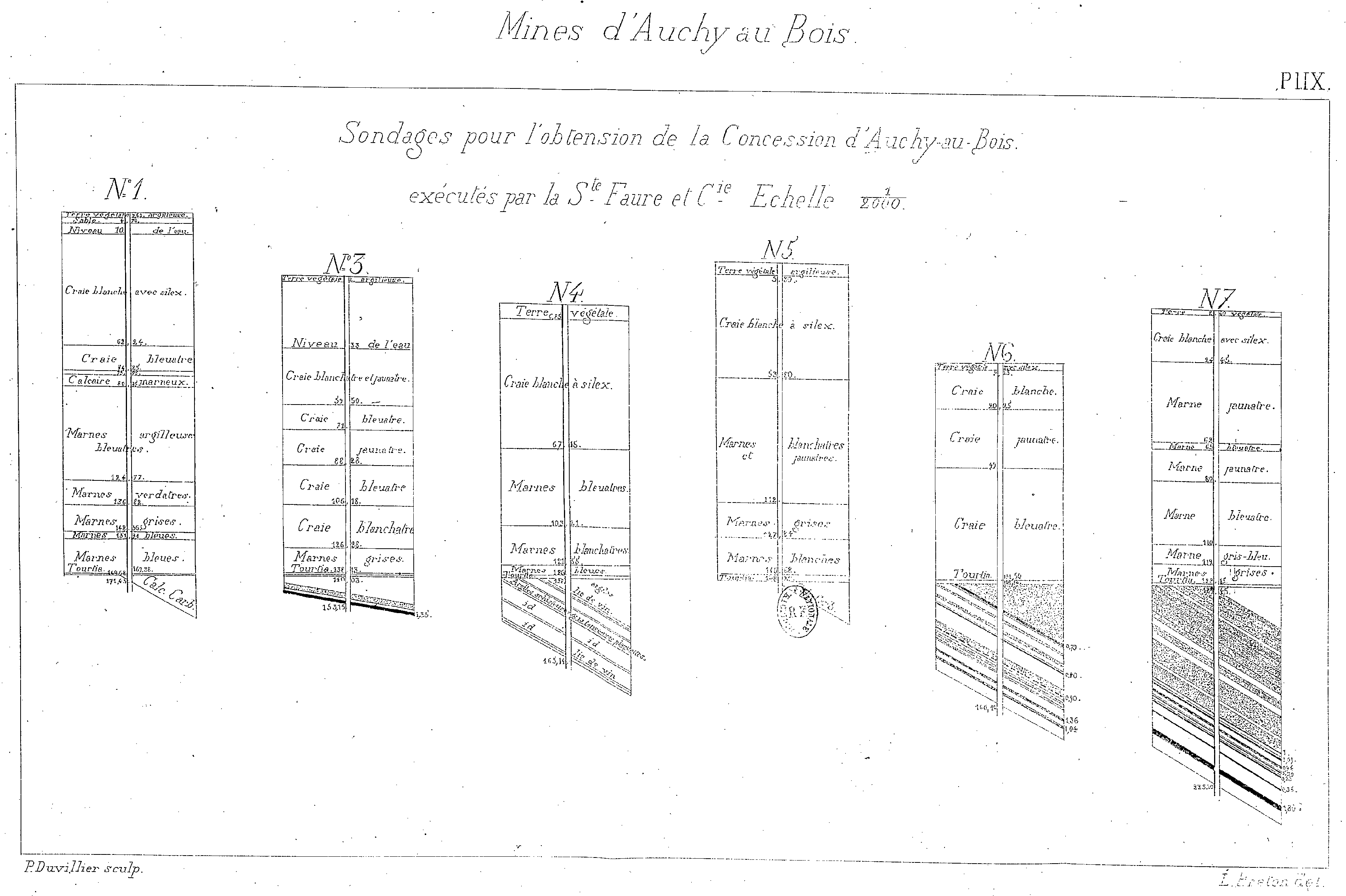 Compagnie des mines d'Auchy-au-Bois.